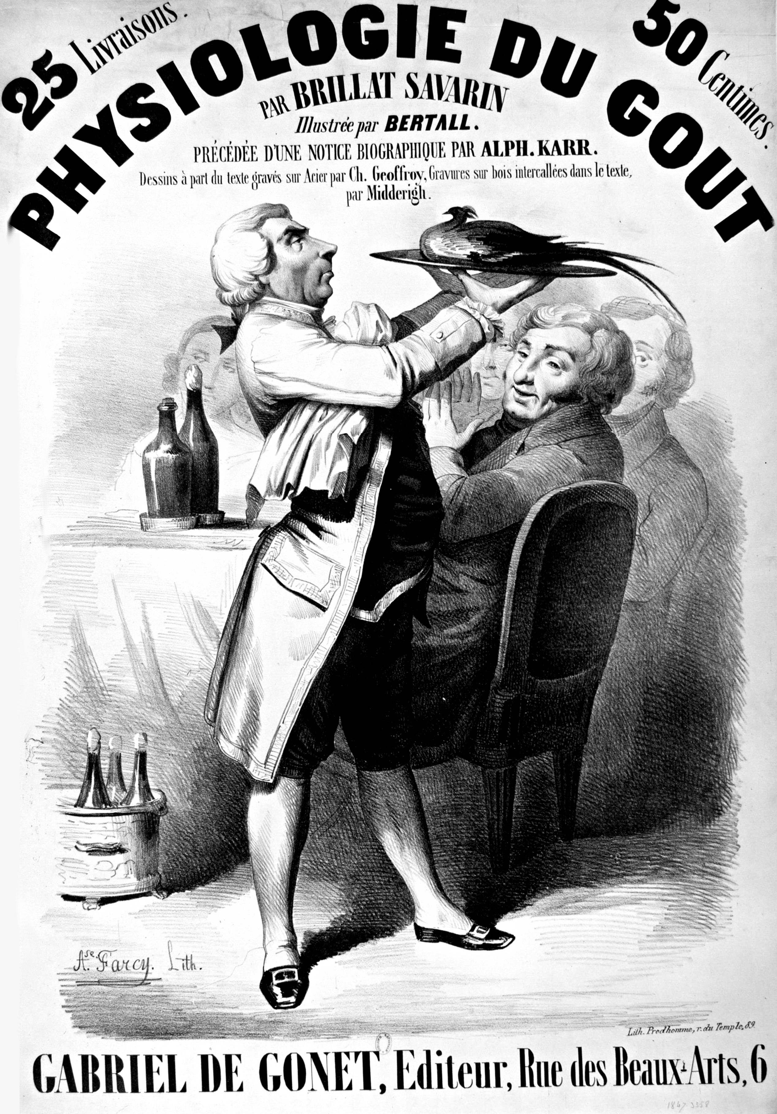 Physiologie du goût par Brillat-Savarin illustrée par Bertall : [affiche] / [Alphonse Farcy] Auteur : Farcy, Alphonse (1817-18..?). Illustrateur Auteur : Bertall (1820-1882). Illustrateur